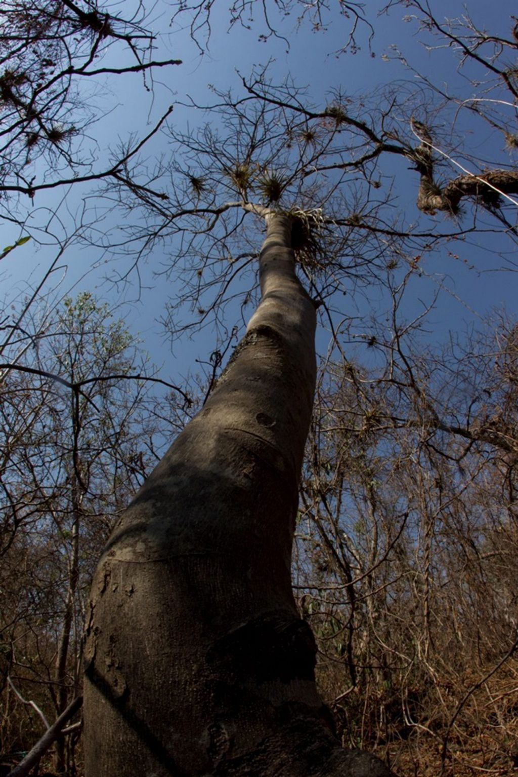 Árbol denominado Esenbeckia vazquezii, endémico del estado de Morelos en México y único en el mundo.